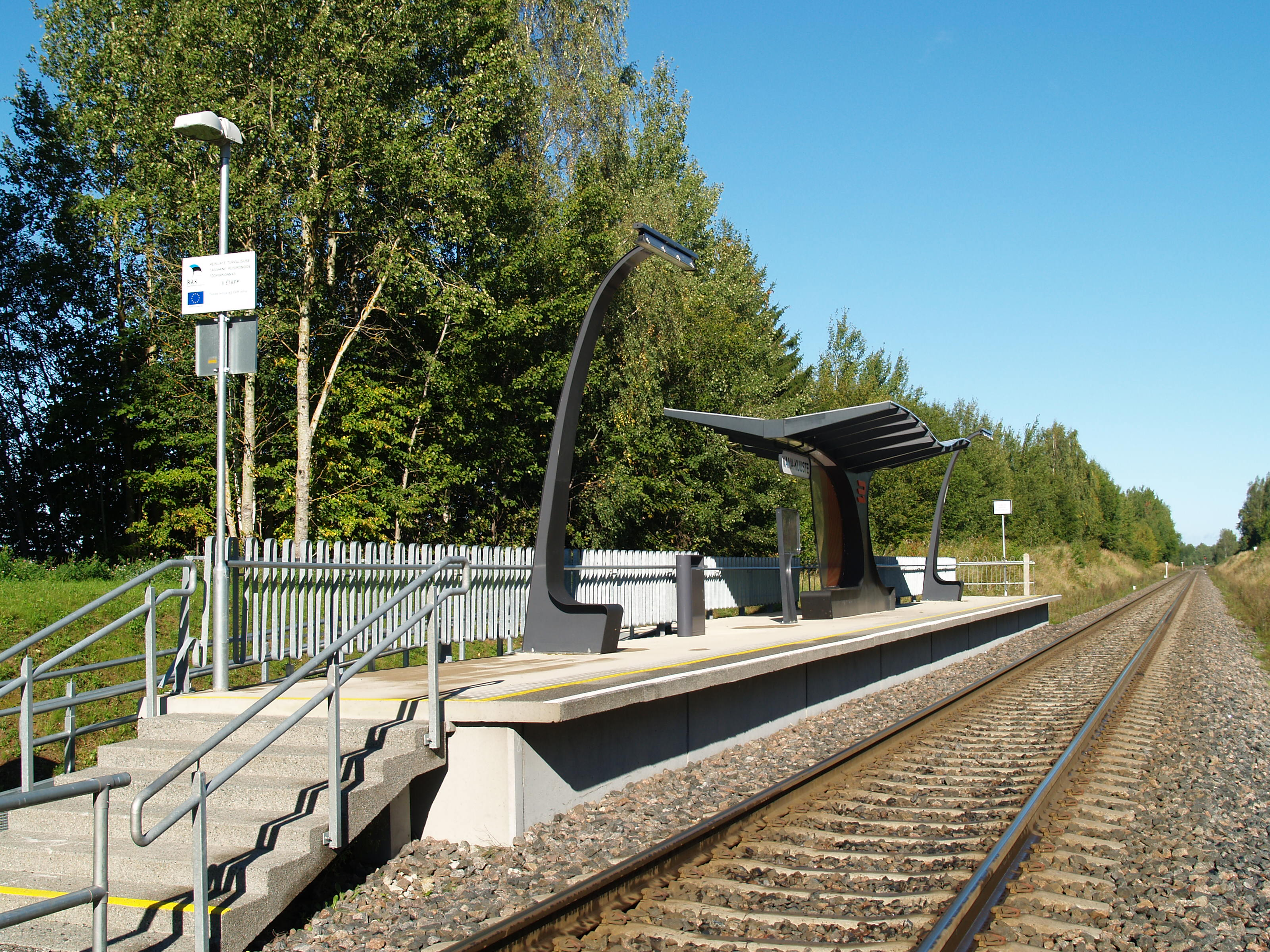 Vana-Kuuste raudteepeatus